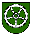 Wappen von Schwarzenholz